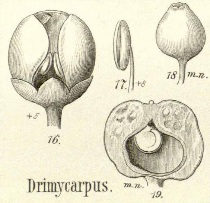 Drimycarpus racemosus en Augustin Pyrame de Candolle, Monographiae phanerogamarum, vol. 4: t. 15, 1883